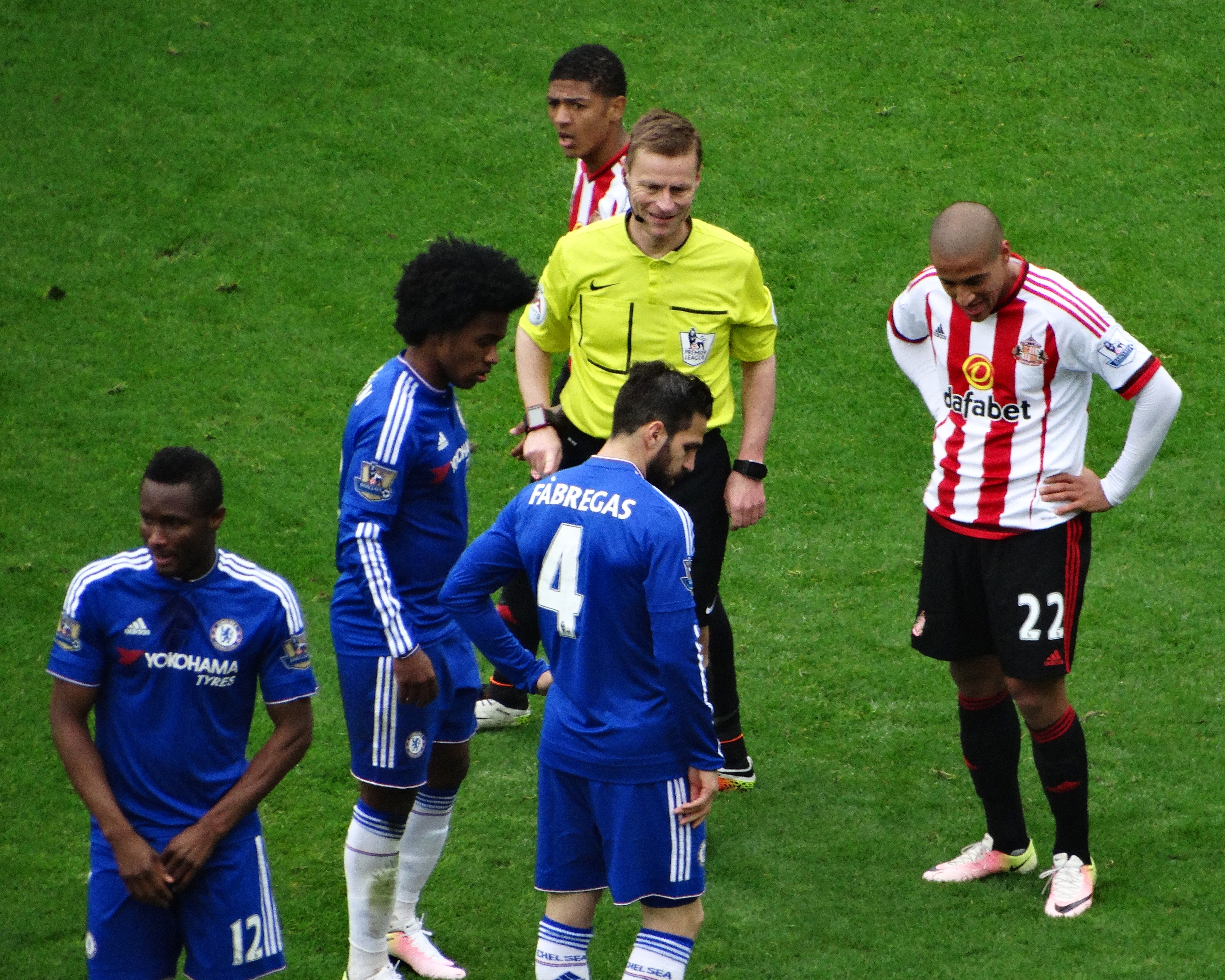 Sunderland 3 Chelsea2